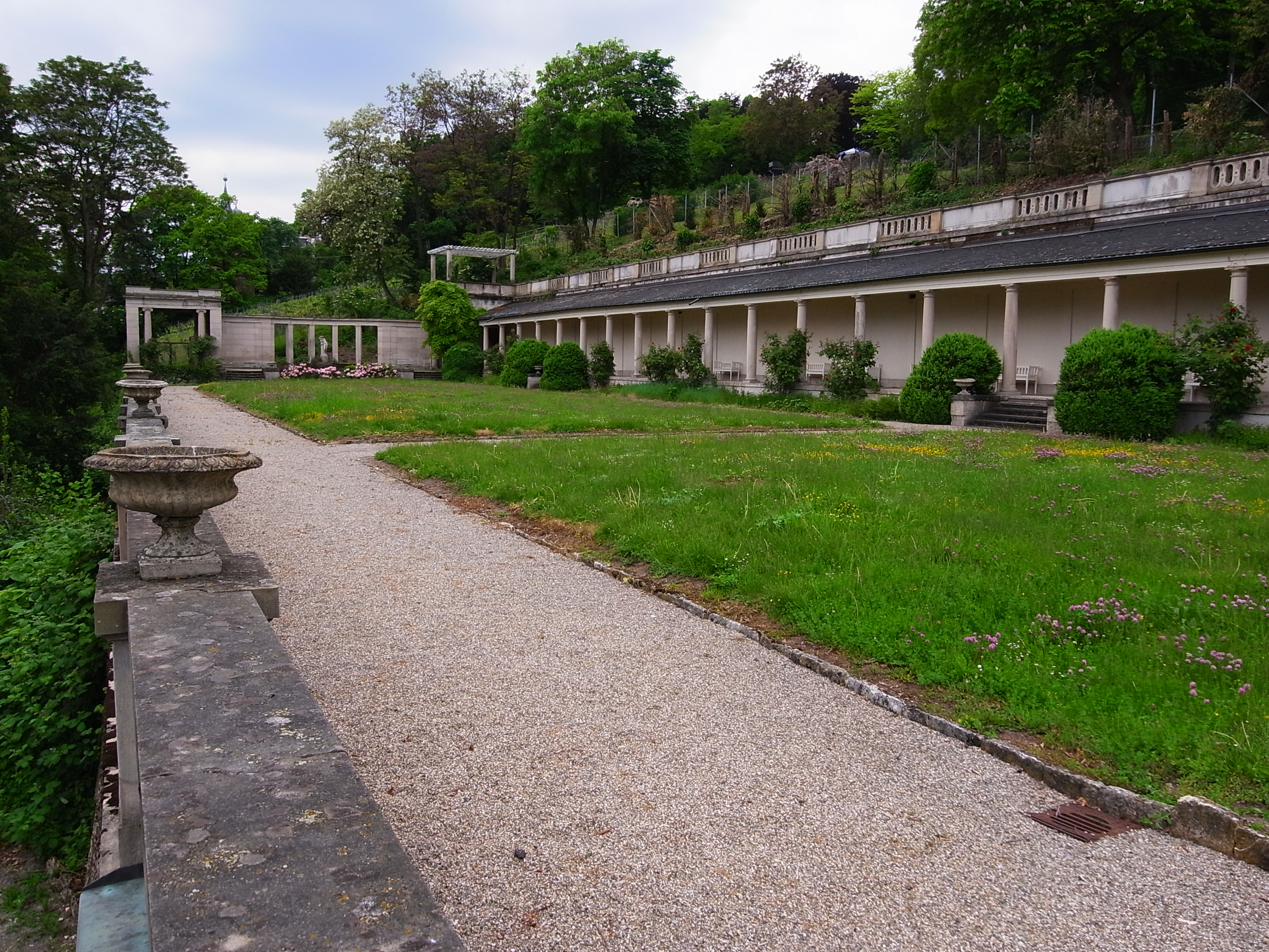 Villa Gemmingen, die Verlängerung der Gartenanlage im Westen des Gebäudes